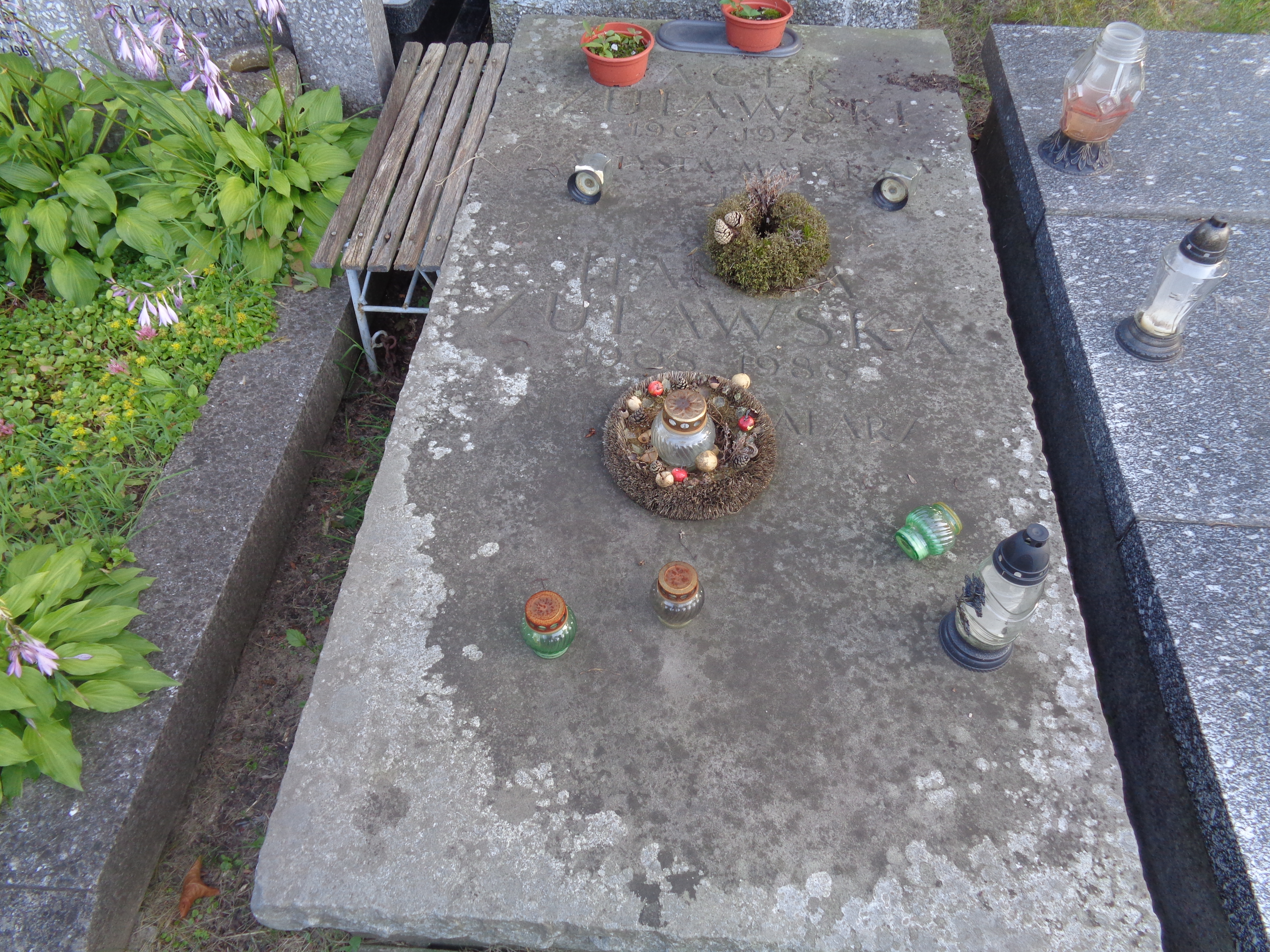 Grób Jacka Żuławskiego na Cmentarzu Wojskowym na Powązkach